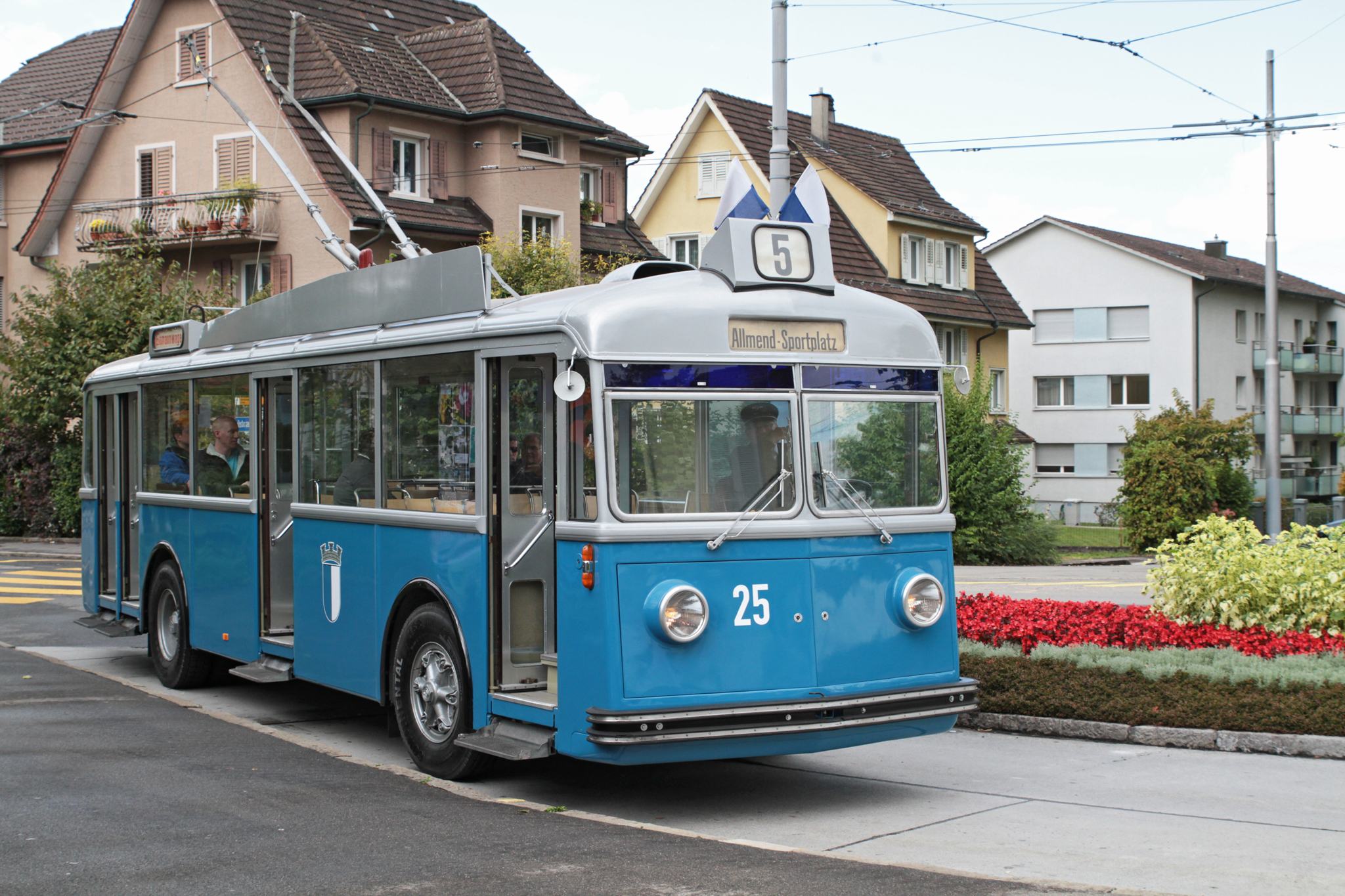 Der FBW/MFO/FFA Trolleybus Nr. 25 der Verkehrsbetriebe Luzern (1949) nach seiner Restaurierung in den Jahren 2015 und 2016 auf einer Extrafahrt für den Trolleybusverein Schweiz in der Wendeschleife Zwyssigplatz (Wesemlin)